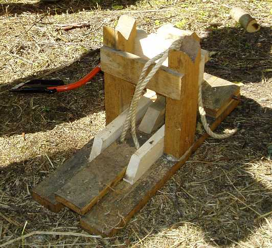 Opspændingsbuk til fastholdelse af træ-emner, der skal bearbejdes i grøn sløjd. Denne prototype er fremstillet af Finn Hermansen fra Dansk Sløjdlærerskole. Heraf navnet. Første omtale i litteraturen var i: Kurt Svarre (red.) et al.: Håndbog i sløjd - andre materialer. (Dansk Skolesløjds Forlag, 2006).